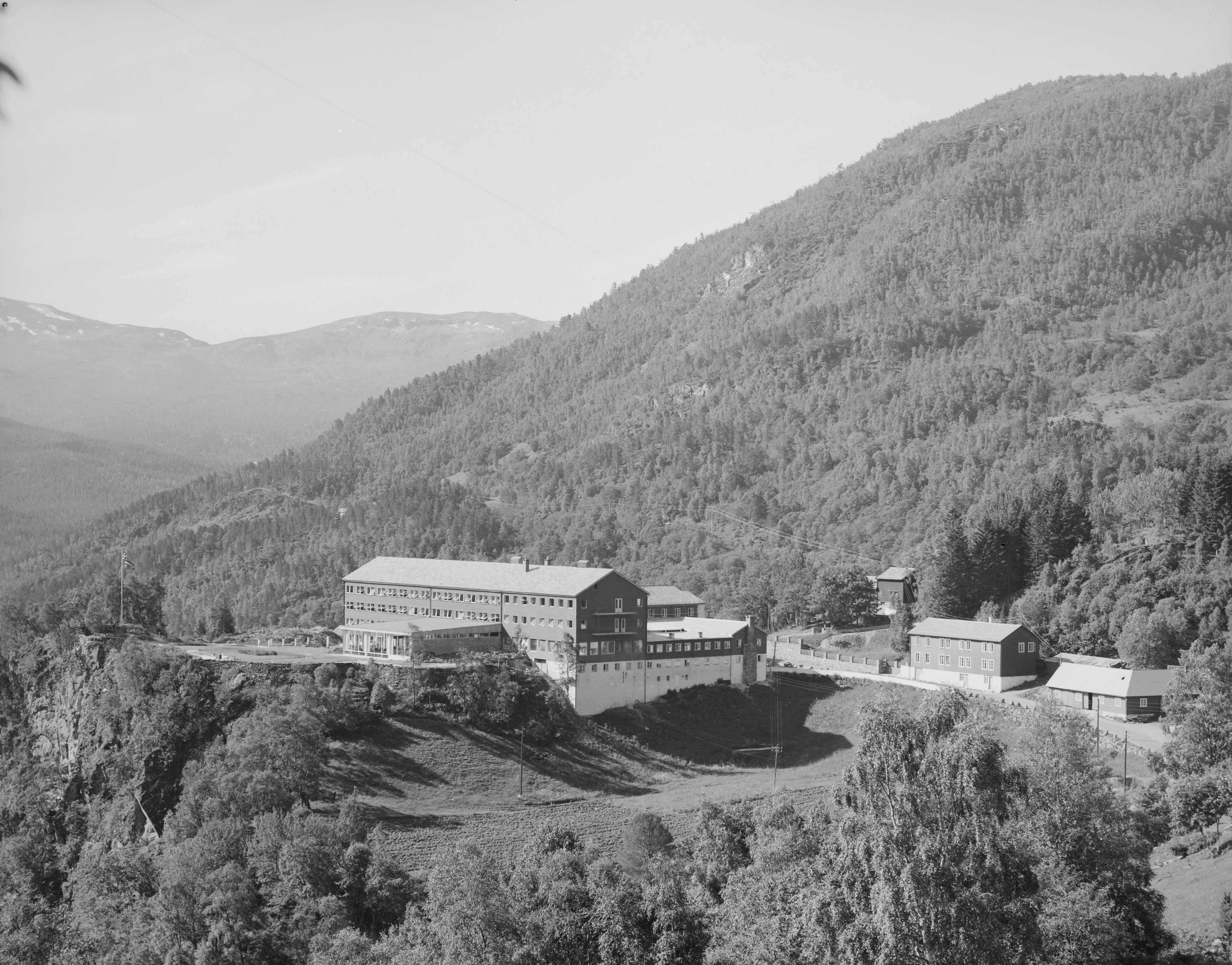 Bildet er hentet fra Nasjonalbibliotekets bildesamling. Anmerkninger til bildet var: Fotograf: ÅM Stalheim, Voss, Hordaland